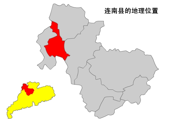 内容介绍：连南县在清远地图上的标示 原创者：zhuwq 创作日期：2005年1月 创作方法：将广东地图用扫描仪输入电脑，再将图片导入FLASH，用画笔描出轮廓，着填充，删除原图片，导出JPG图象便大工告成，这样制作的优点是，开始辛苦了点，但绘制别的市便替换颜色即可。